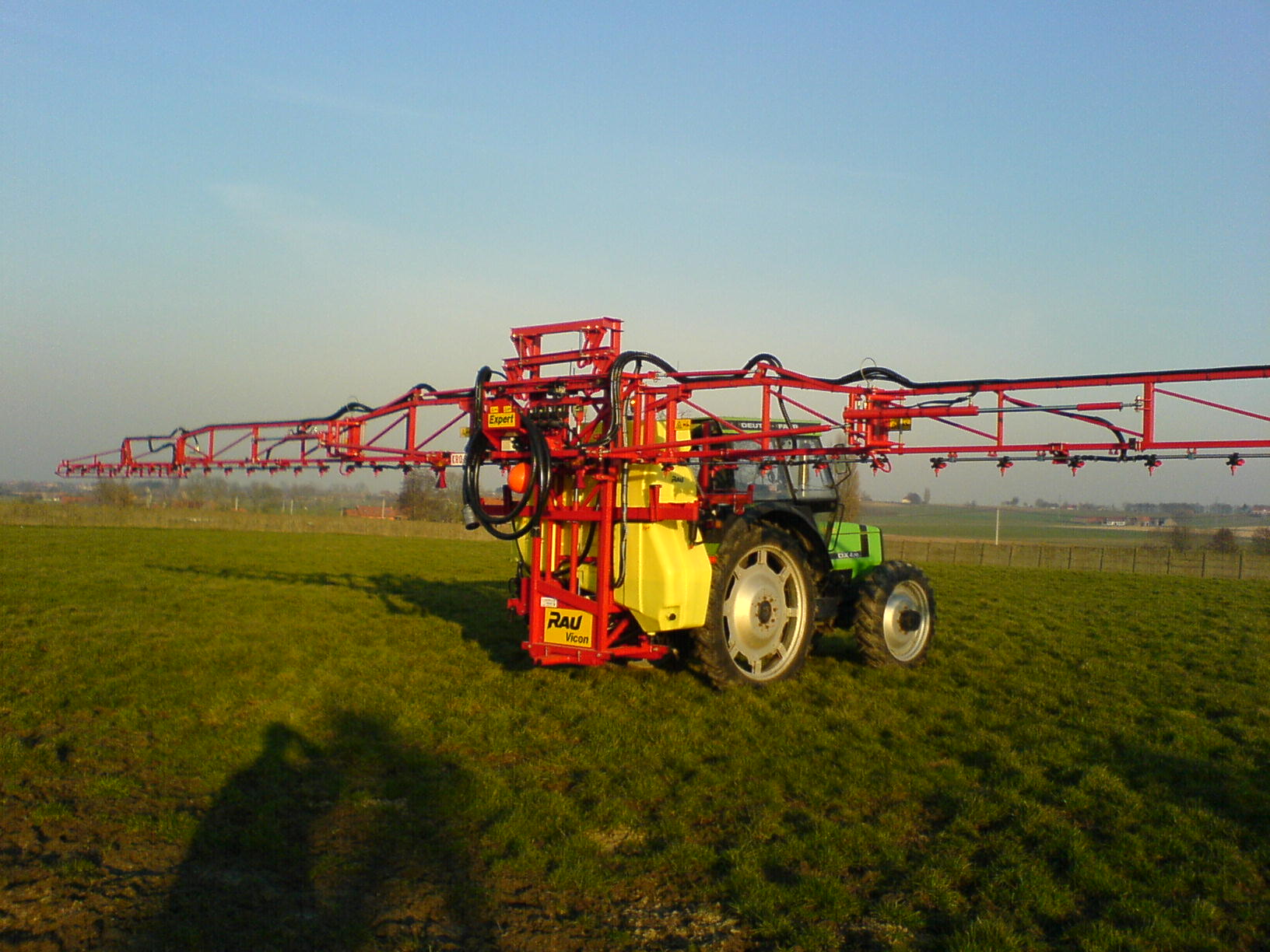 Deutz-Fahr DX 4.70, gedragen spuitmachine Rau Vicon Expert in spuitstand